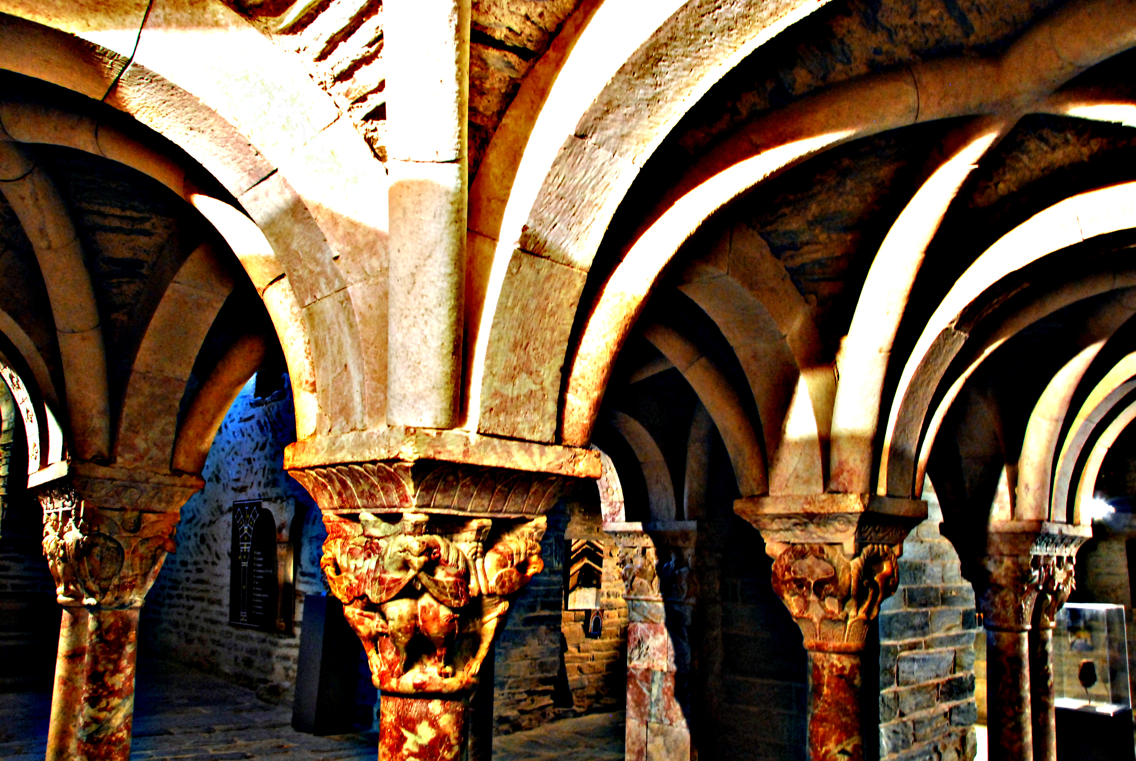 Serrabone, Empore, mittlere Säulen Nr 10+7